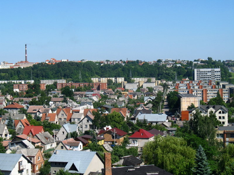 Vilijampolė. Vaizdas nuo Milikonių kalno.